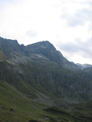 Pico Gran Quairat . Vista desde el refugio de Espingo. Esta imagen ha sido tomada personalmente por Avh